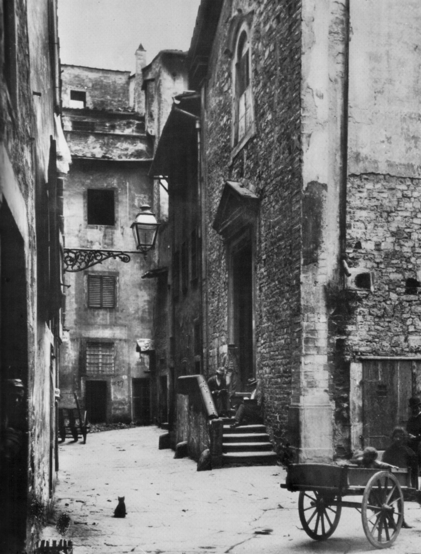 Chiesa di sant'andrea before demolition in 1881-82